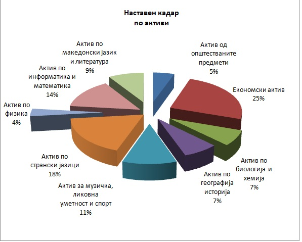 structural table